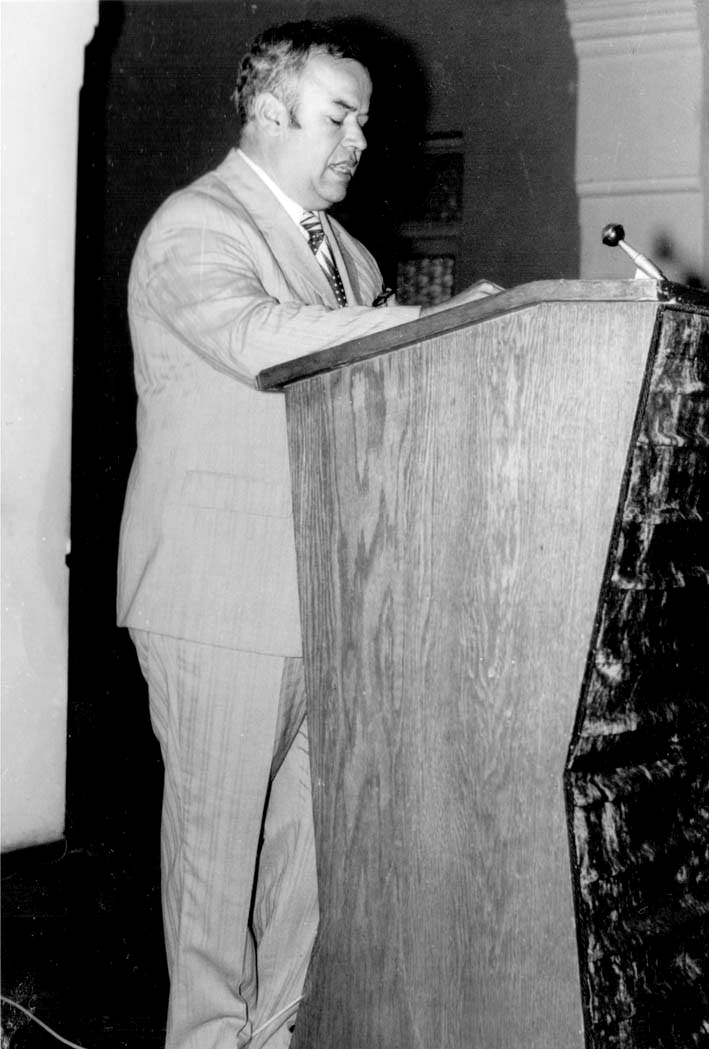 Никола Војновски говор